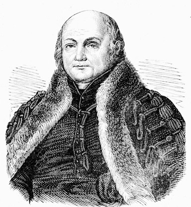 Budai Ézsaiás (1766–1841) történetíró, pedagógus, az MTA tiszteleti tagja, a magyarországi klasszika-filológia úttörője portréja